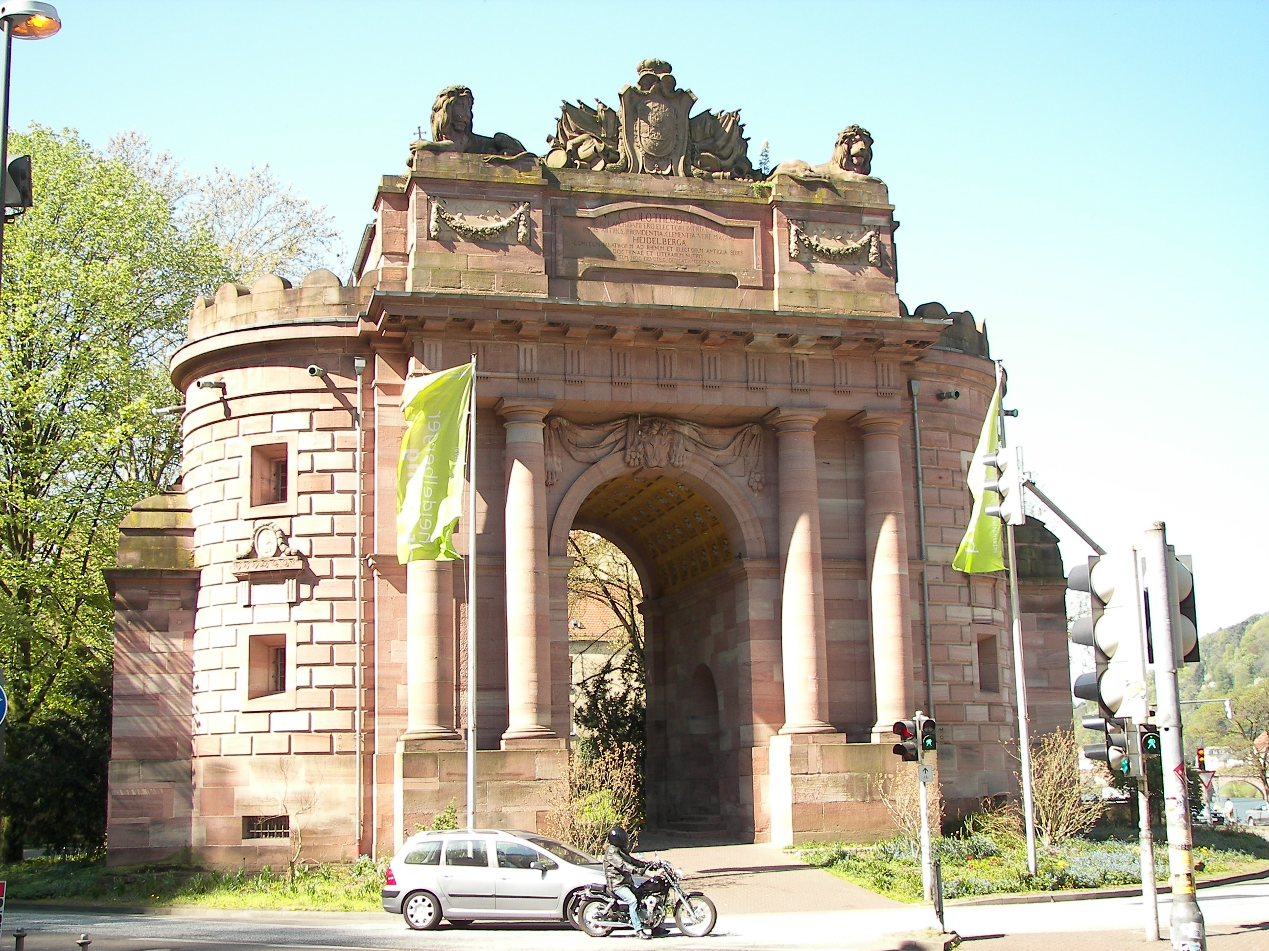 The Karlstor in Heidelberg / Germany